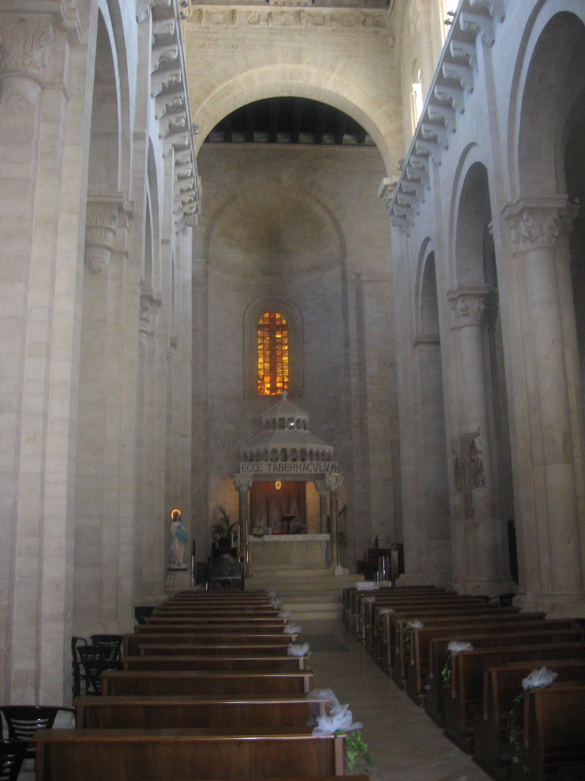 Navata centrale della Cattedrale di Ruvo di Puglia